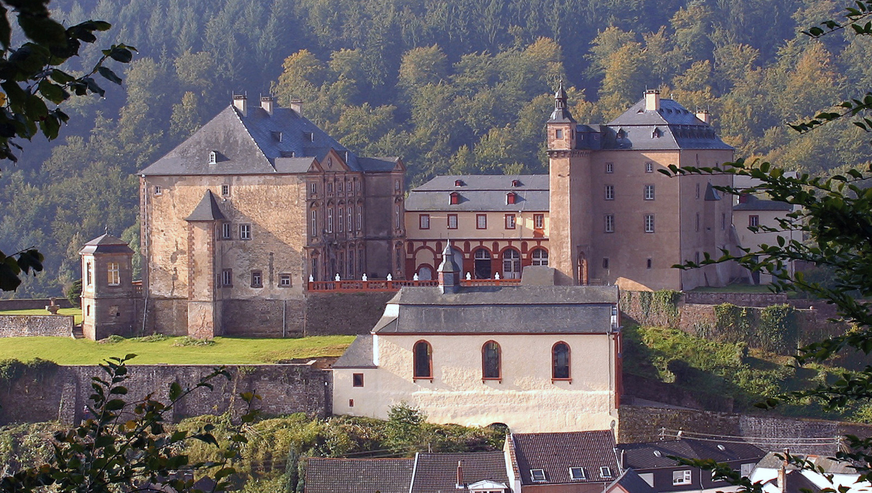 Schloss Malberg, Ansicht von Osten